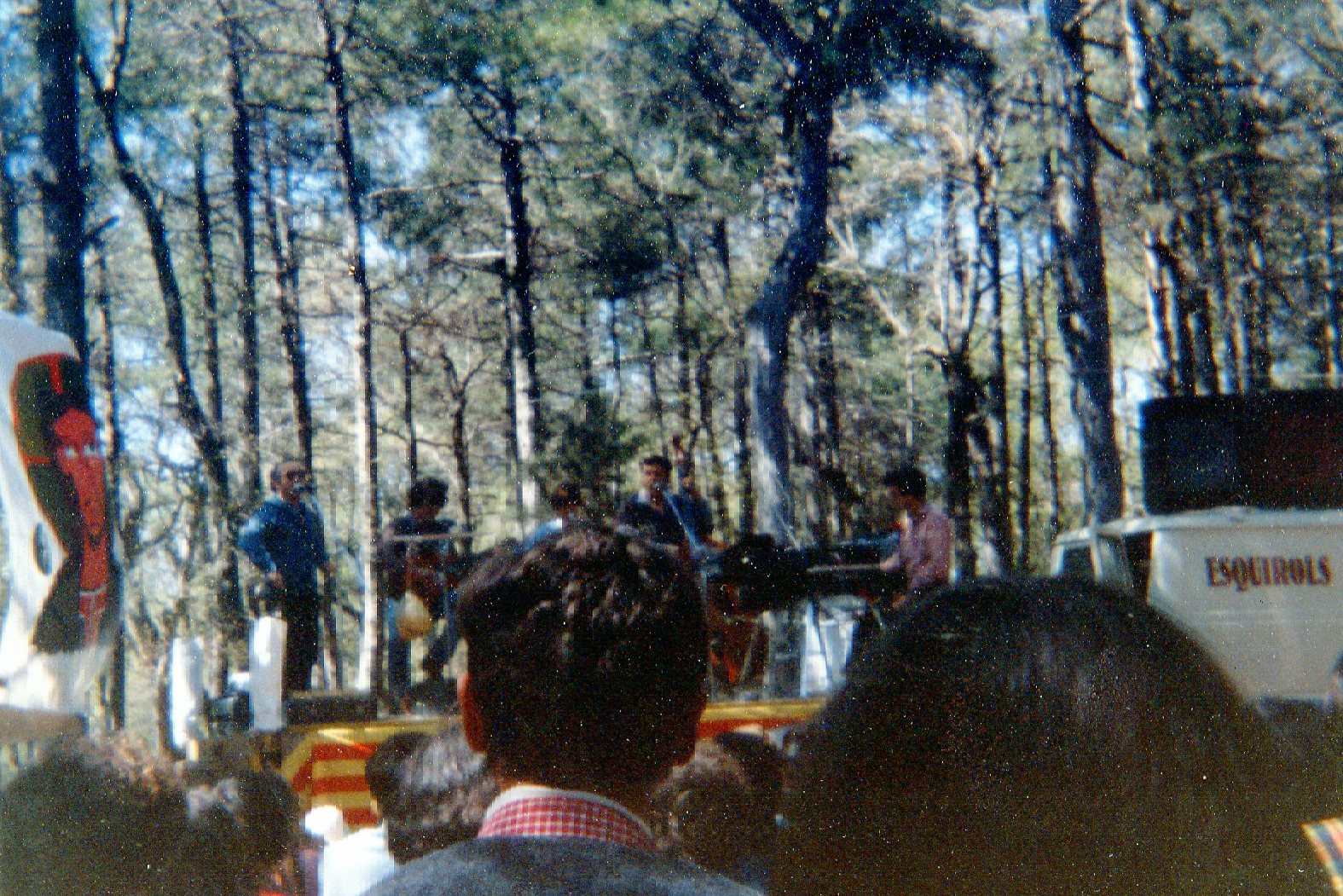 Imatge del concert d'Els Esquirols en la Trobada General de Hora-3 de l'any 1982 a Sant Guim de Freixenet. Hora3 va ser un moviment cristià, d'adolescents, joves i adults, de finals del segle XX a Catalunya.